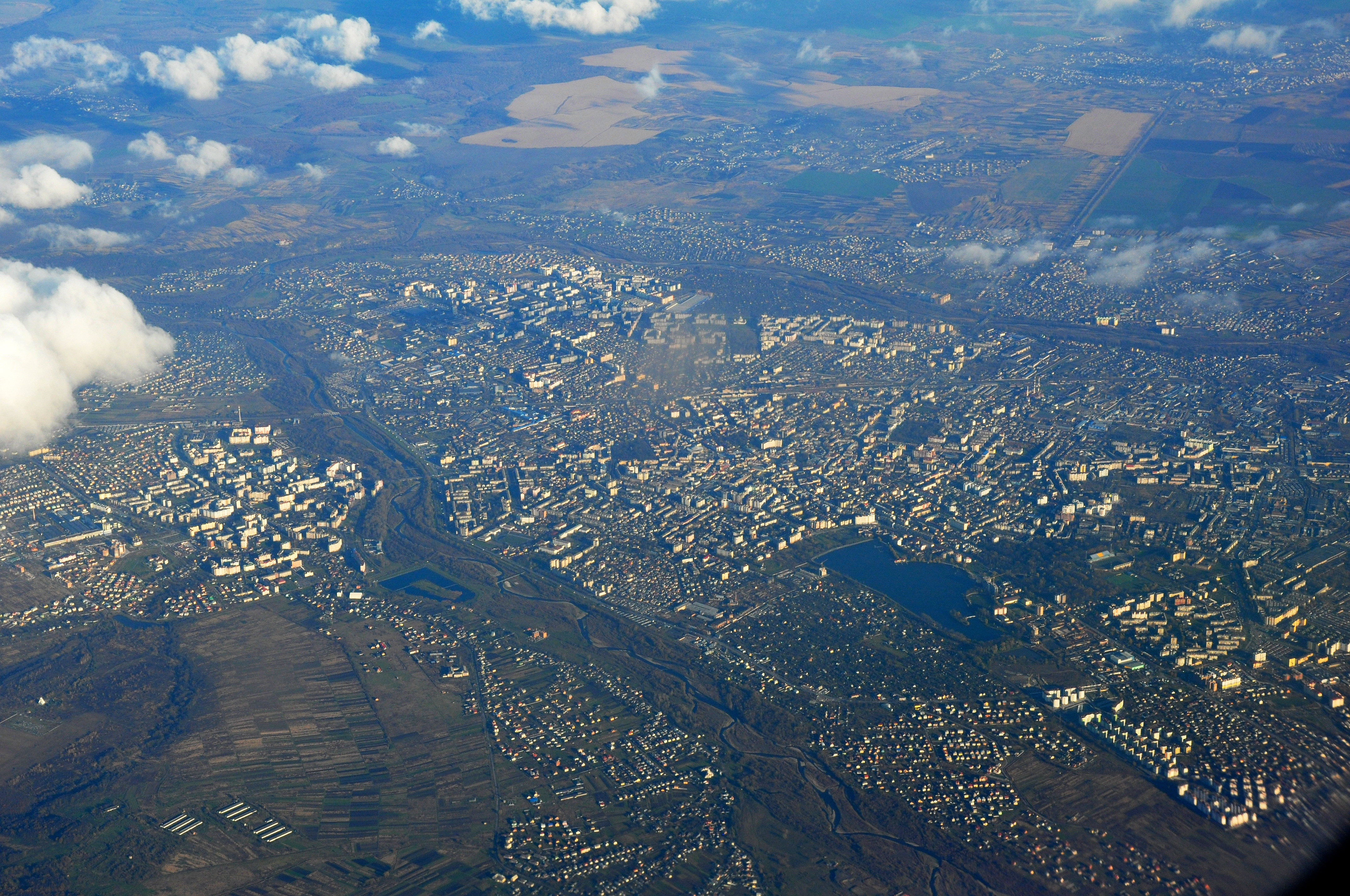 Вигляд з висоти 3 км